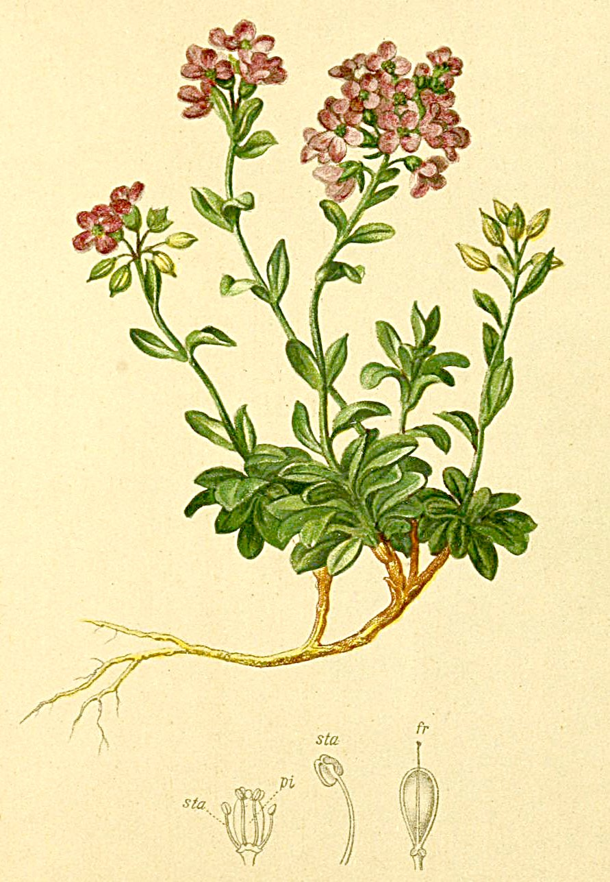 Noccaea rotundifolia (Thlaspi rotundifolium)